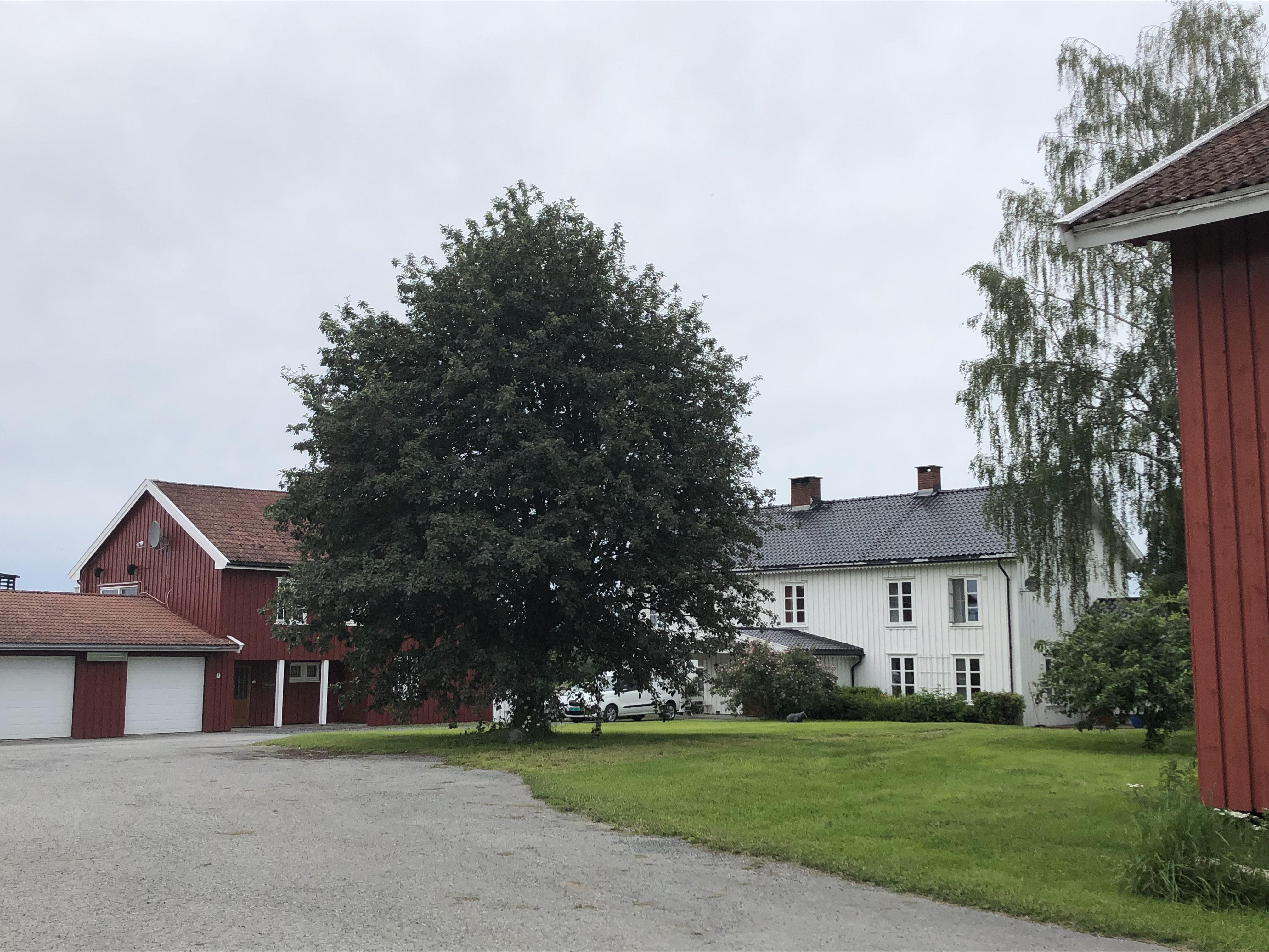 Frok Gård, Froksveien 5, Ringerike.